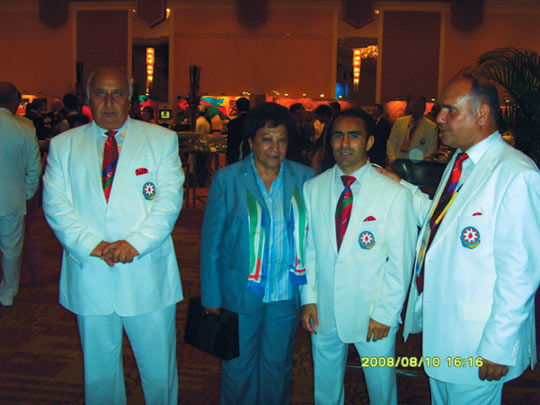 Pekin Olimpiya Oyunları